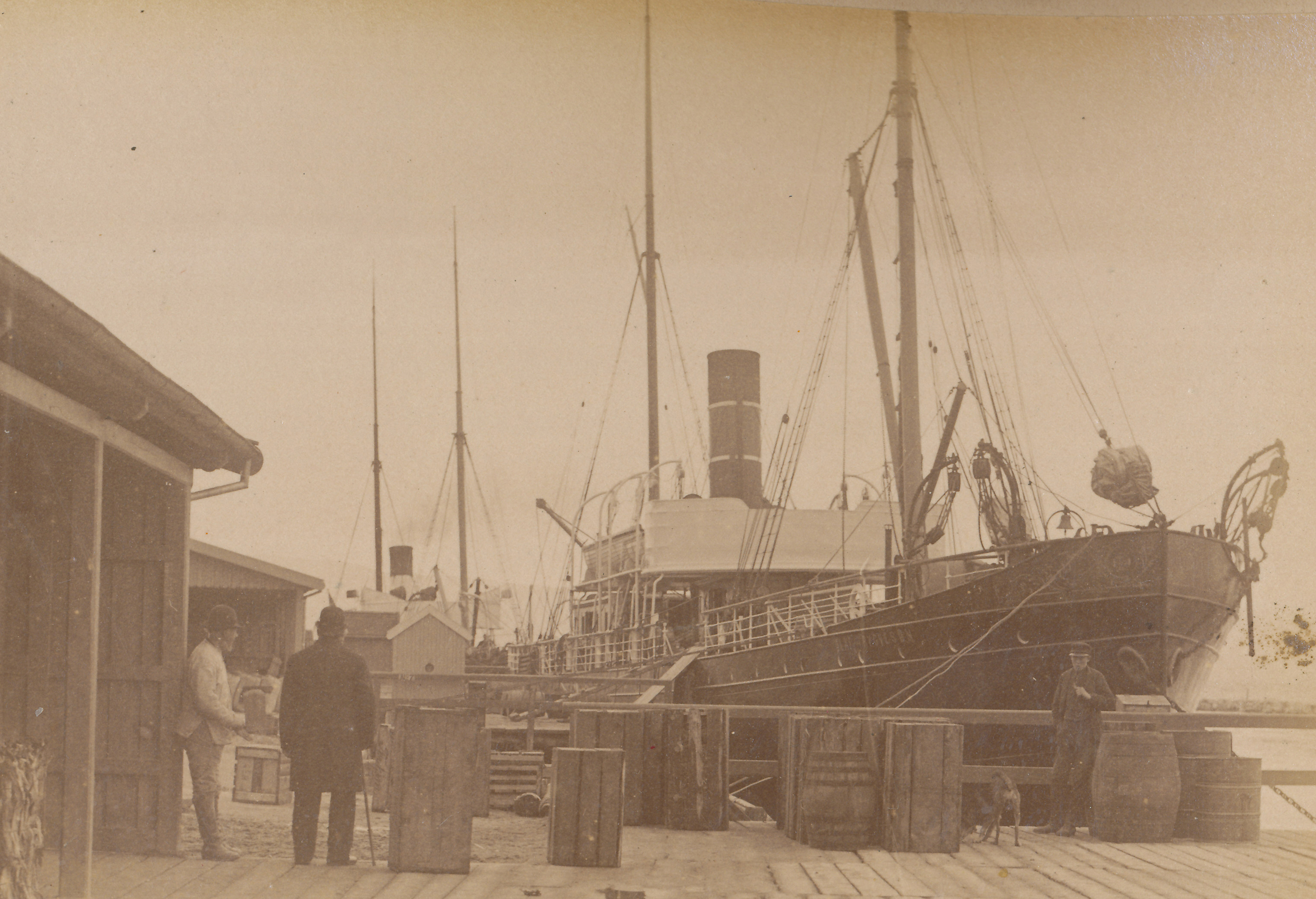 Nordenfjeldske Dampskibsselskabs "Olaf Trygvesøn" på 663 bruttoregistertonn, bygget hos Wigham Richardson & Co. i Newcastle upon Tyne i 1876. Fotograf: Jørgen Wickstrøm (1893).